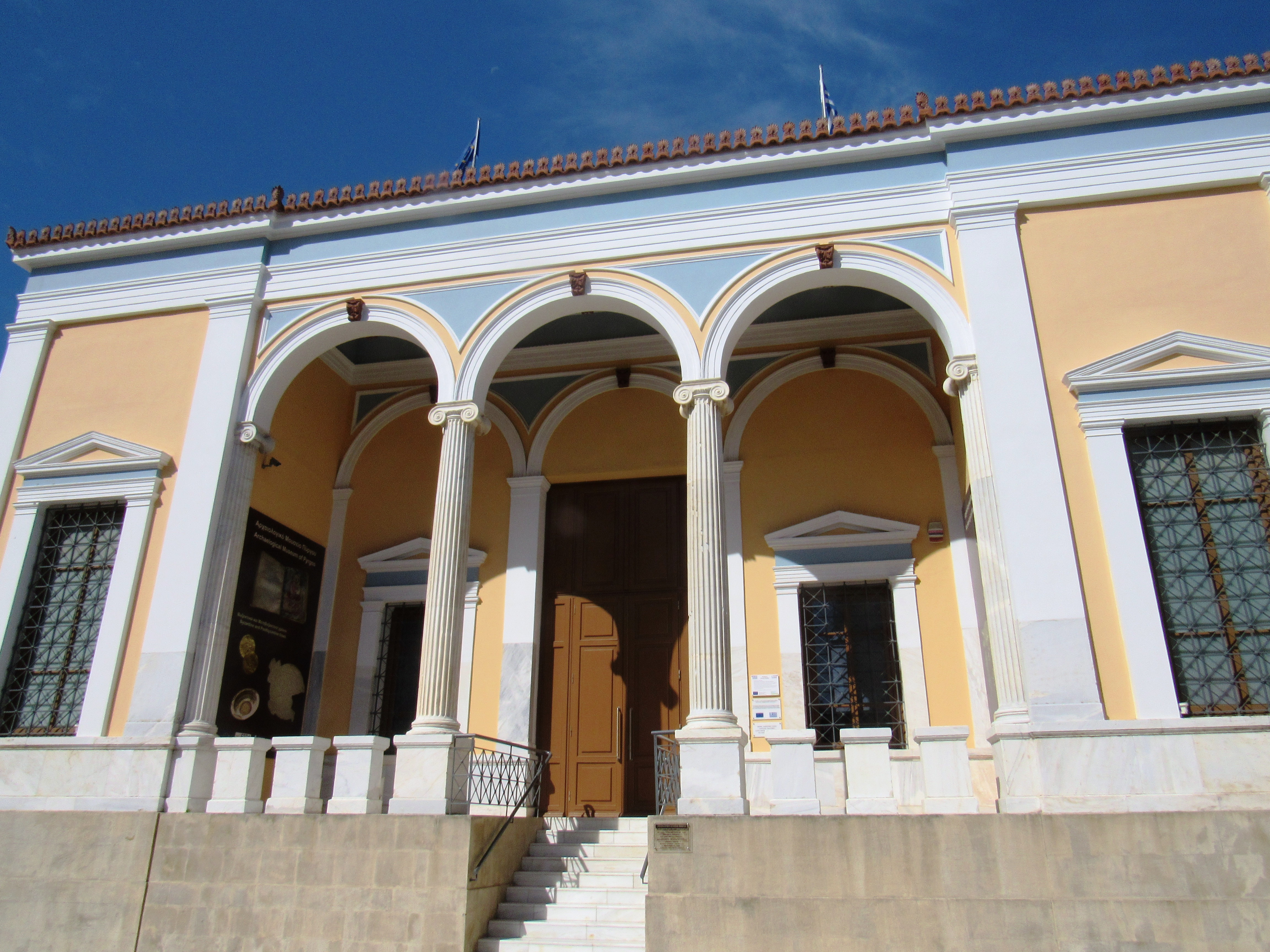 «Δημοτική Αγορά Πύργου Ηλείας»